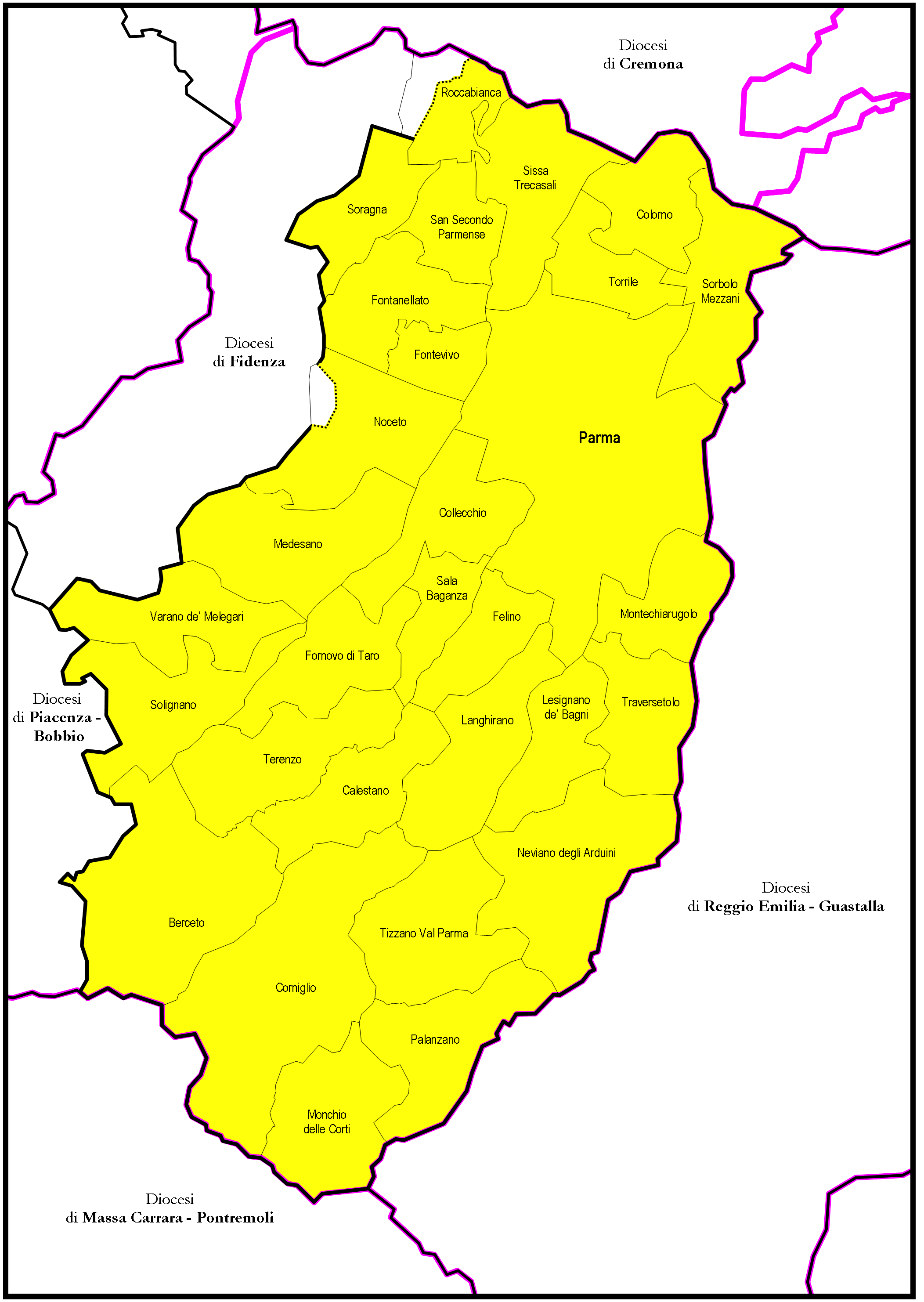 Mappa della Diocesi di Parma